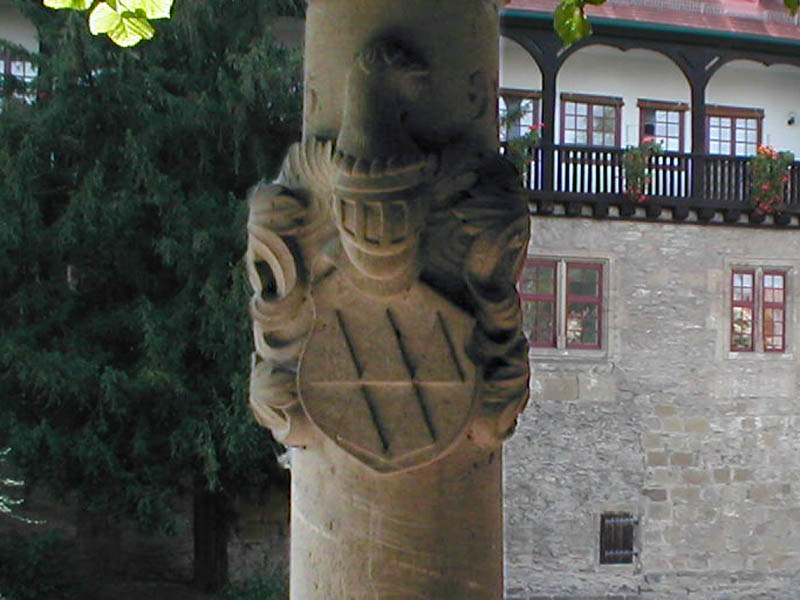 Wappen der Wambold(t) von Umbstatt in der Lindenanlage in Neuenstadt am Kocher, datiert 1591, erneuert zwischen 1960 und 1980.